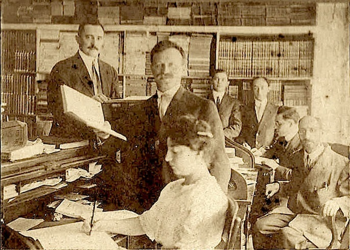 חנות ומשרדי התאגדות ההוצאה לאור היהודית "צנטרל"